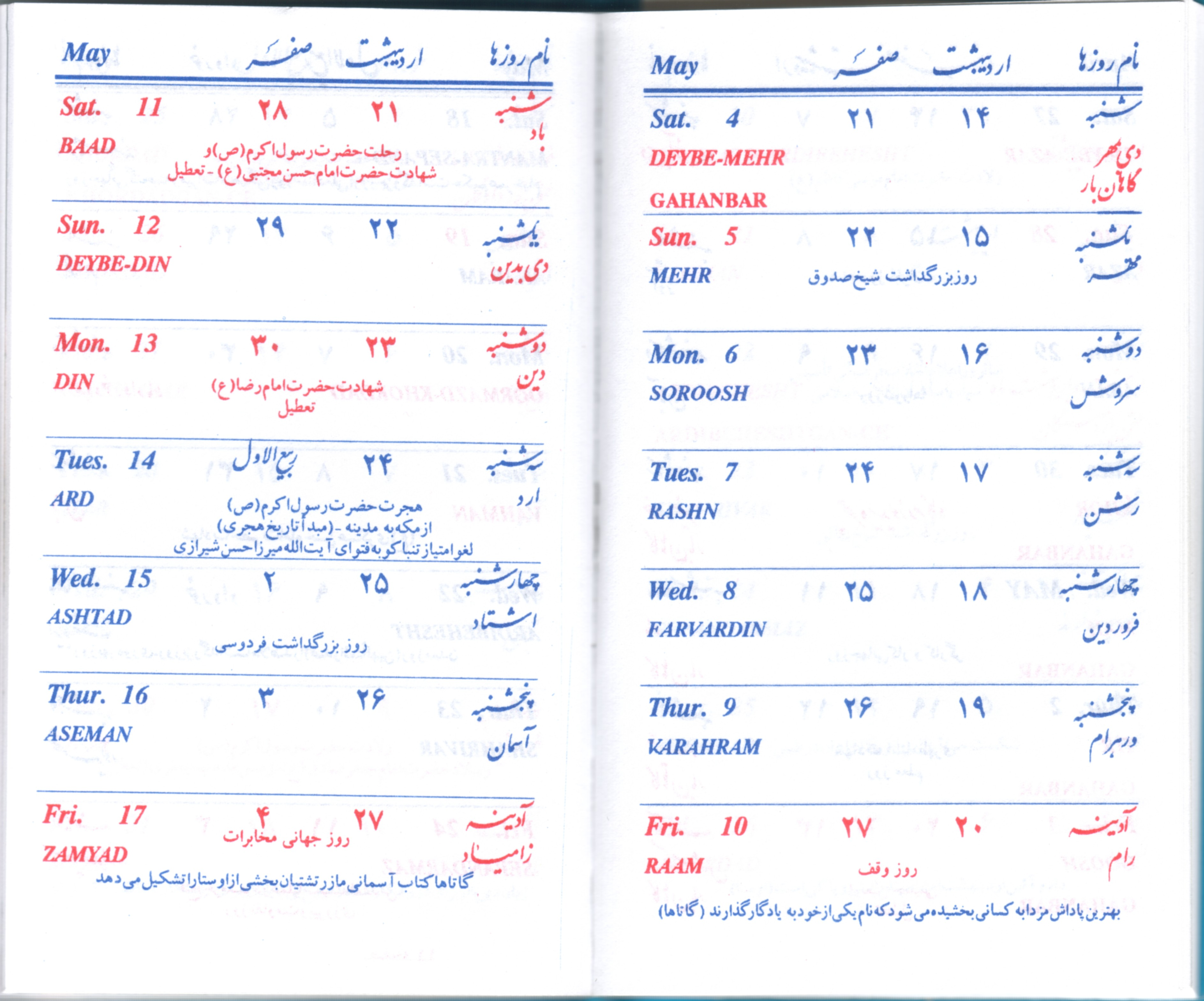 Doppelseite aus einem iranischen Kalender für 3740 zoroastrisch, 1381 persisch, 1423 islamisch, 2002 gregorianisch (von rechts nach links)